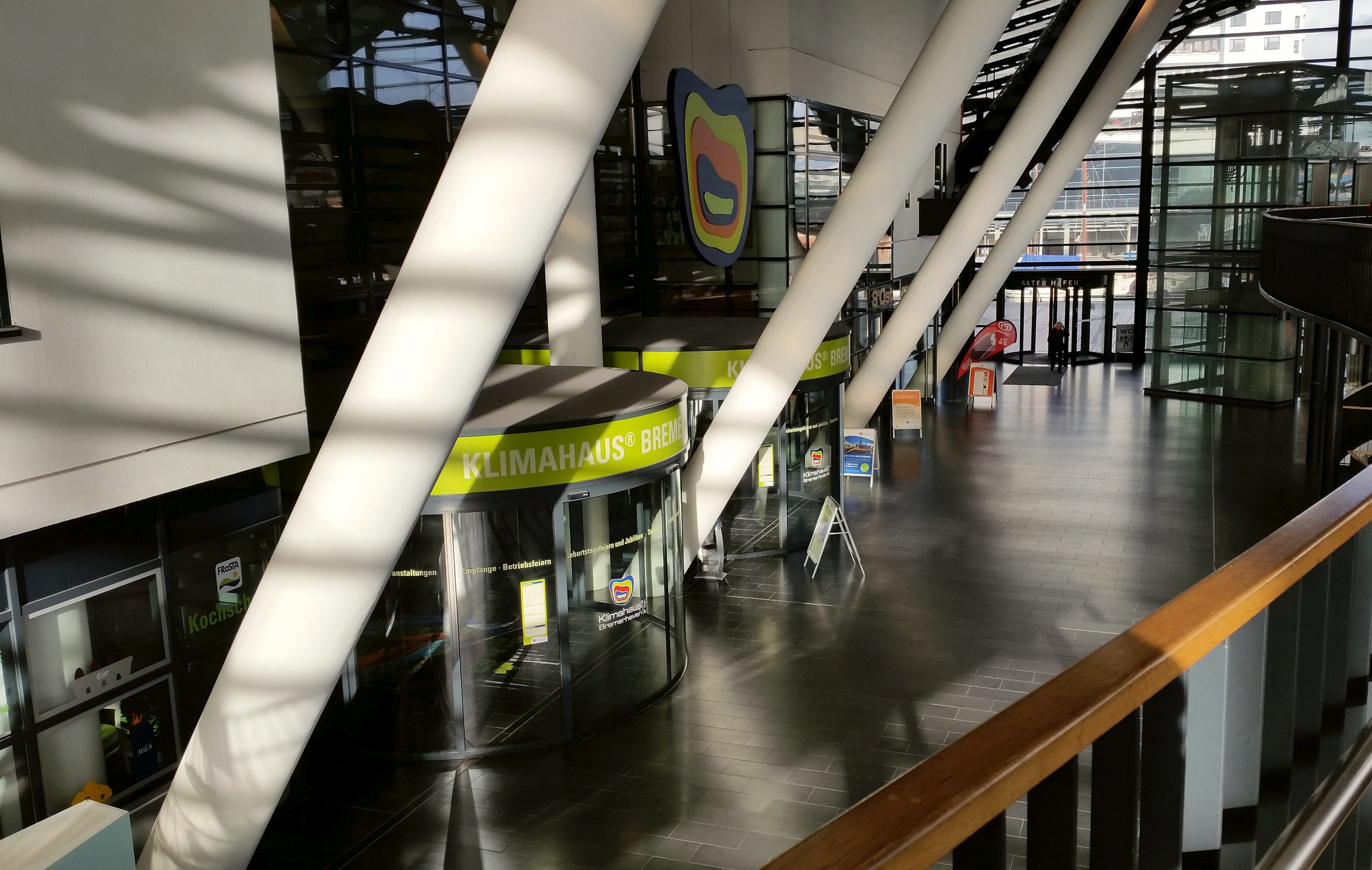 Eingang Klimahaus Bremerhaven - von der Einkaufspassage Columbus Center her fotografiert